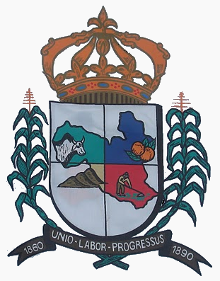 Brasão da Prefeitura de Cerro Azul - Paraná - Brazil.